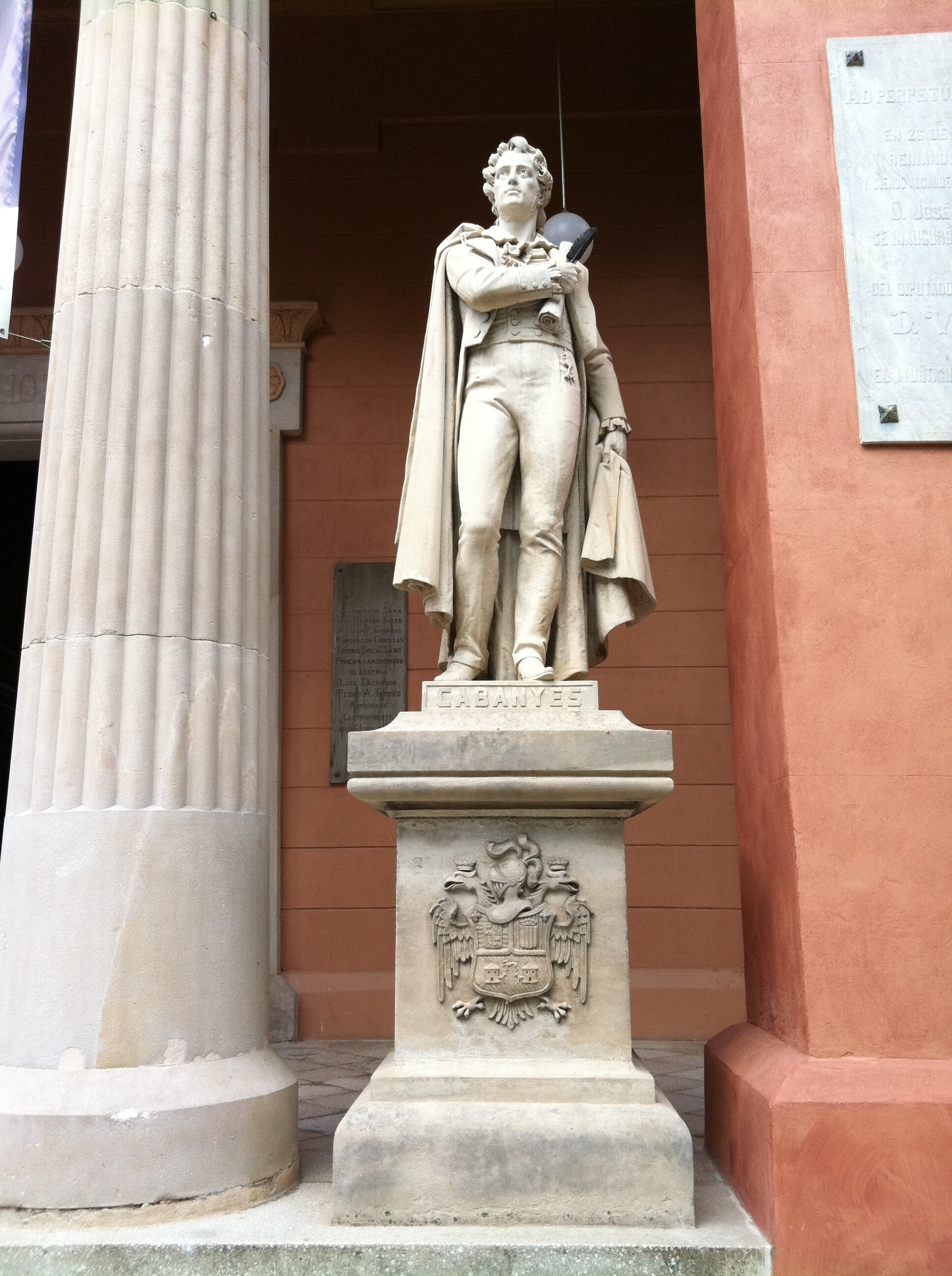 Estatua de Manuel de Cabanyes, Biblioteca-Museu Víctor Balaguer.